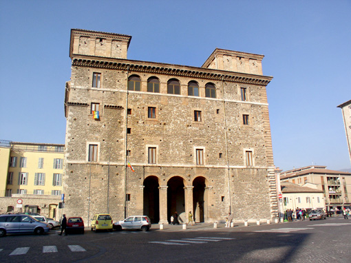 Terni (Italy) - Palazzo Spada, sede del Consiglio Comunale